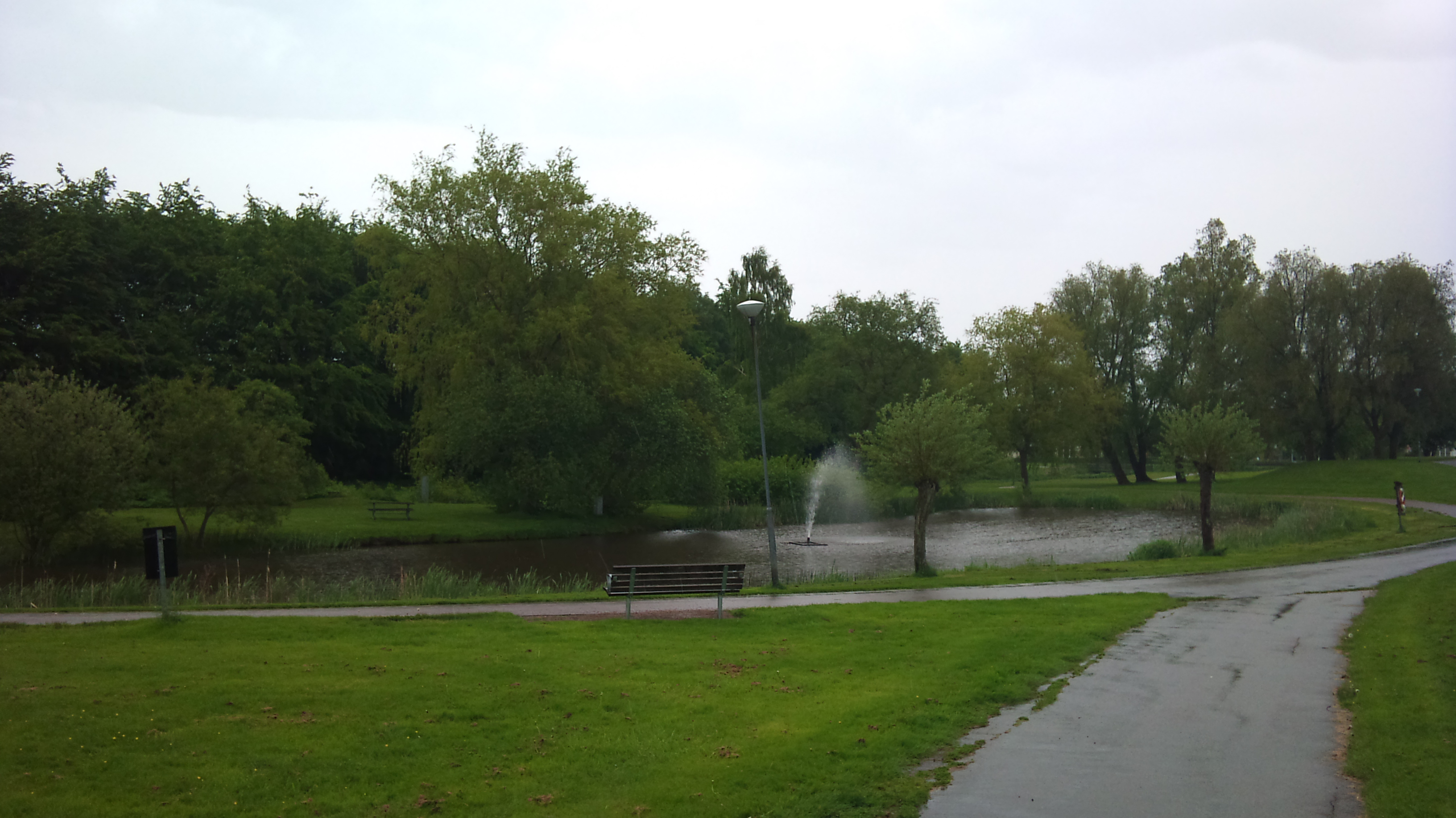 En sjö i en park i Svalöv, Skåne